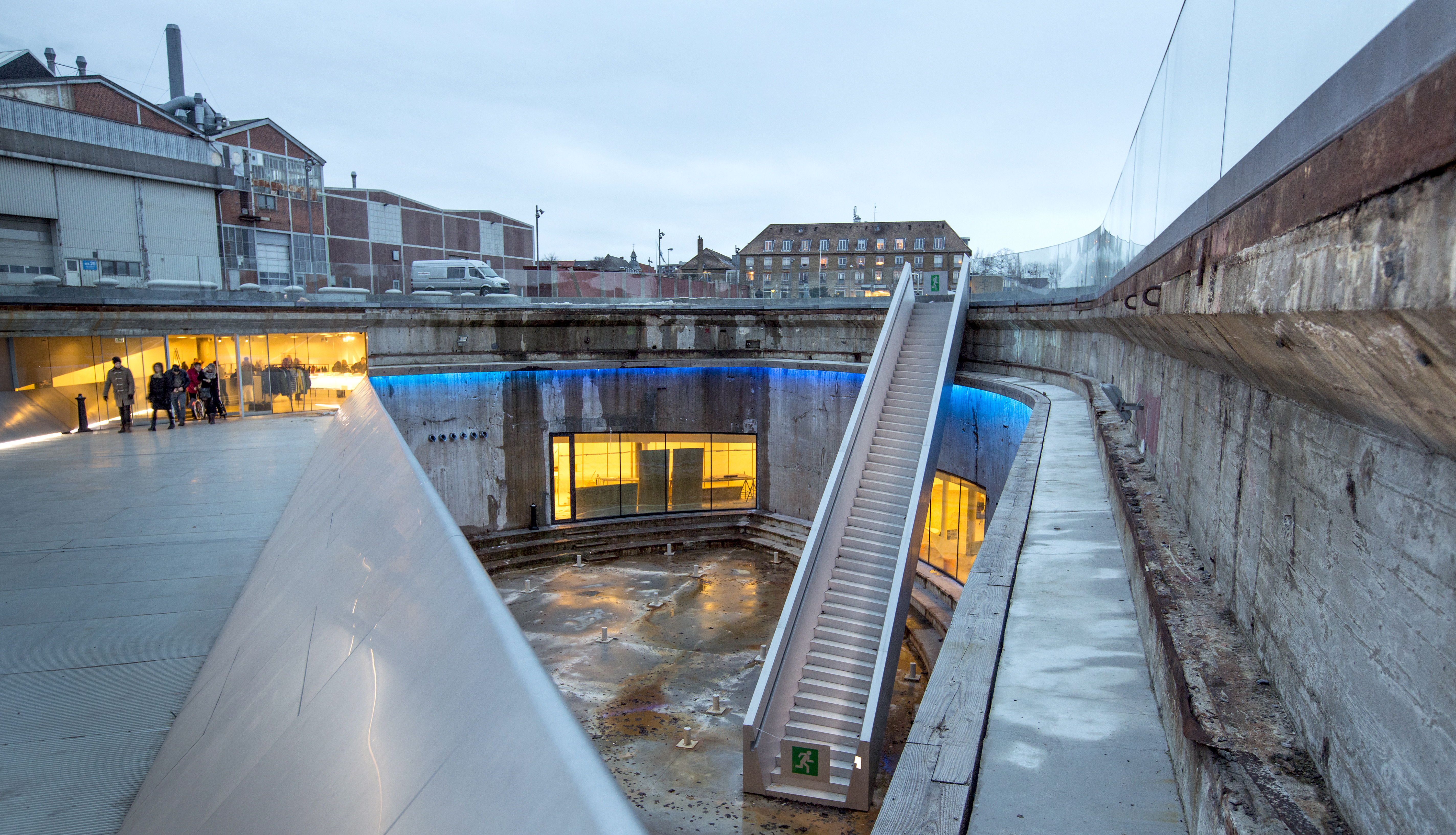 Danish Maritime Museum in Helsingør, Denmark Museet är ritat av danska arkitektfirman Bjarke Ingels Group, BIG. I januari 2014 vann vandt M/S Museet for Søfart priset ”Building of the Year 2014” i kategorien ”Cultural Architecture”. Samma månad nominerades museet till priset af Archdaily til den internationale pris 'Building Of The Year 2014'. Photo: News Øresund - Johan Wessman © News Øresund(CC BY 3.0) Detta verk av News Øresund är licensierat under en Creative Commons Erkännande 3.0 Unported-licens (CC BY 3.0). Bilden får fritt publiceras under förutsättning att källa anges. The picture can be used freely under the prerequisite that the source is given. News Øresund, Malmö, Sweden. Øresund är en oberoende regional nyhetsbyrå som ingår i projektet Øresund Media Platform som drivs av Øresundsinstituttet i partnerskap med Lunds universitet och Roskilde Universitet och med delfinansiering från EU (Interreg IV A Öresund) och 14 regionala; icke kommersiella aktörer.